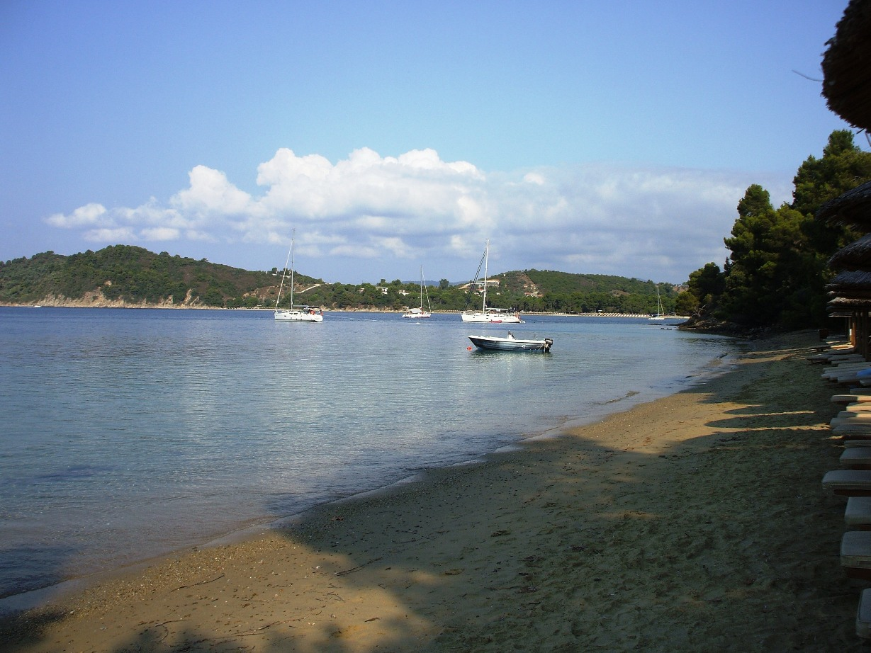 Скјатос - плаже Марата и Кукунаријес.